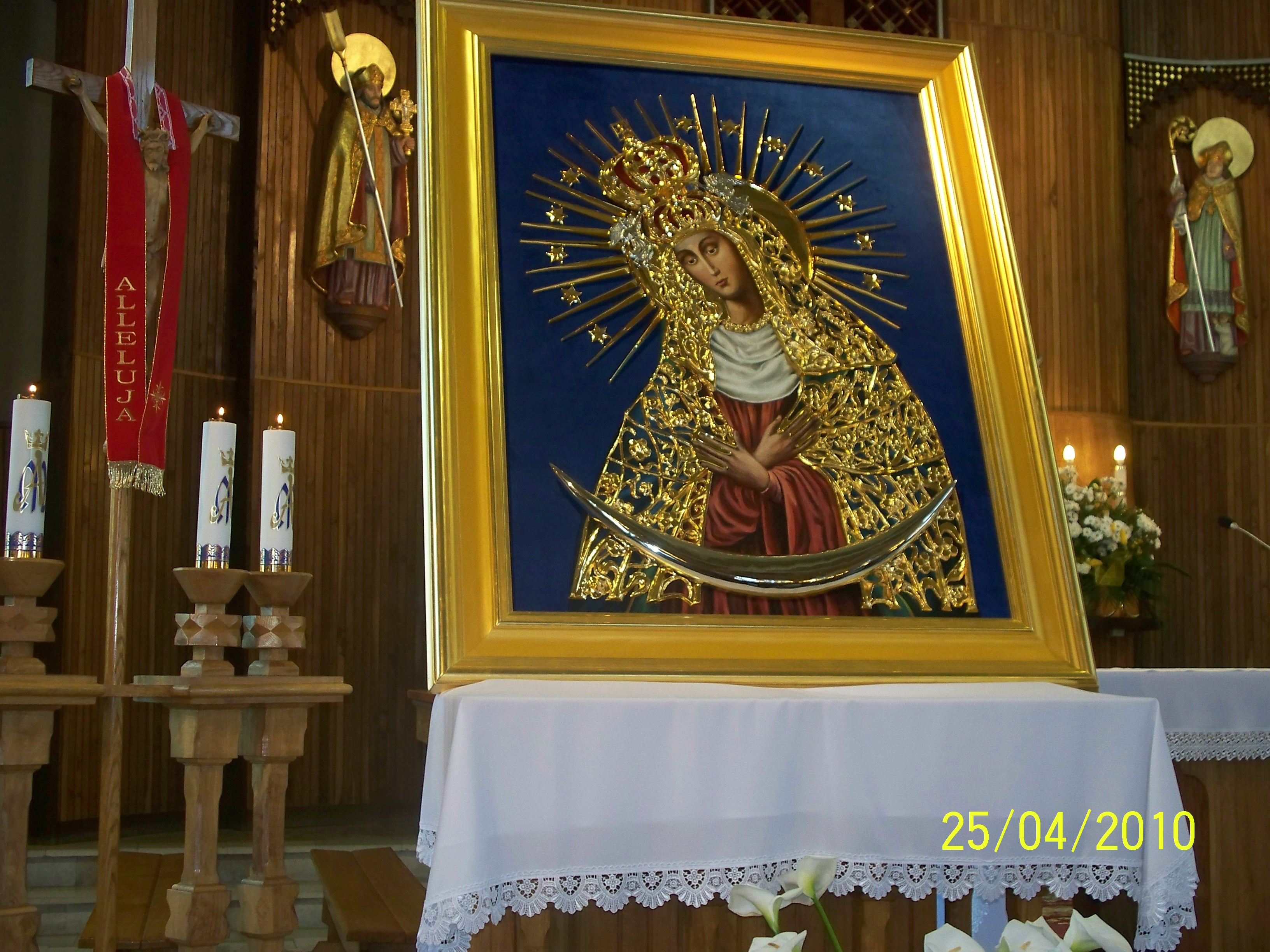 8 listopada 2010 roku nastąpiło poświęcenie nowego Ołtarza Głównego w kościele pw. NMP Matki Miłosierdzia w Szepietowie. Na fotografii widoczny jest wcześniejszy ołtarz z odnowionym obrazem.